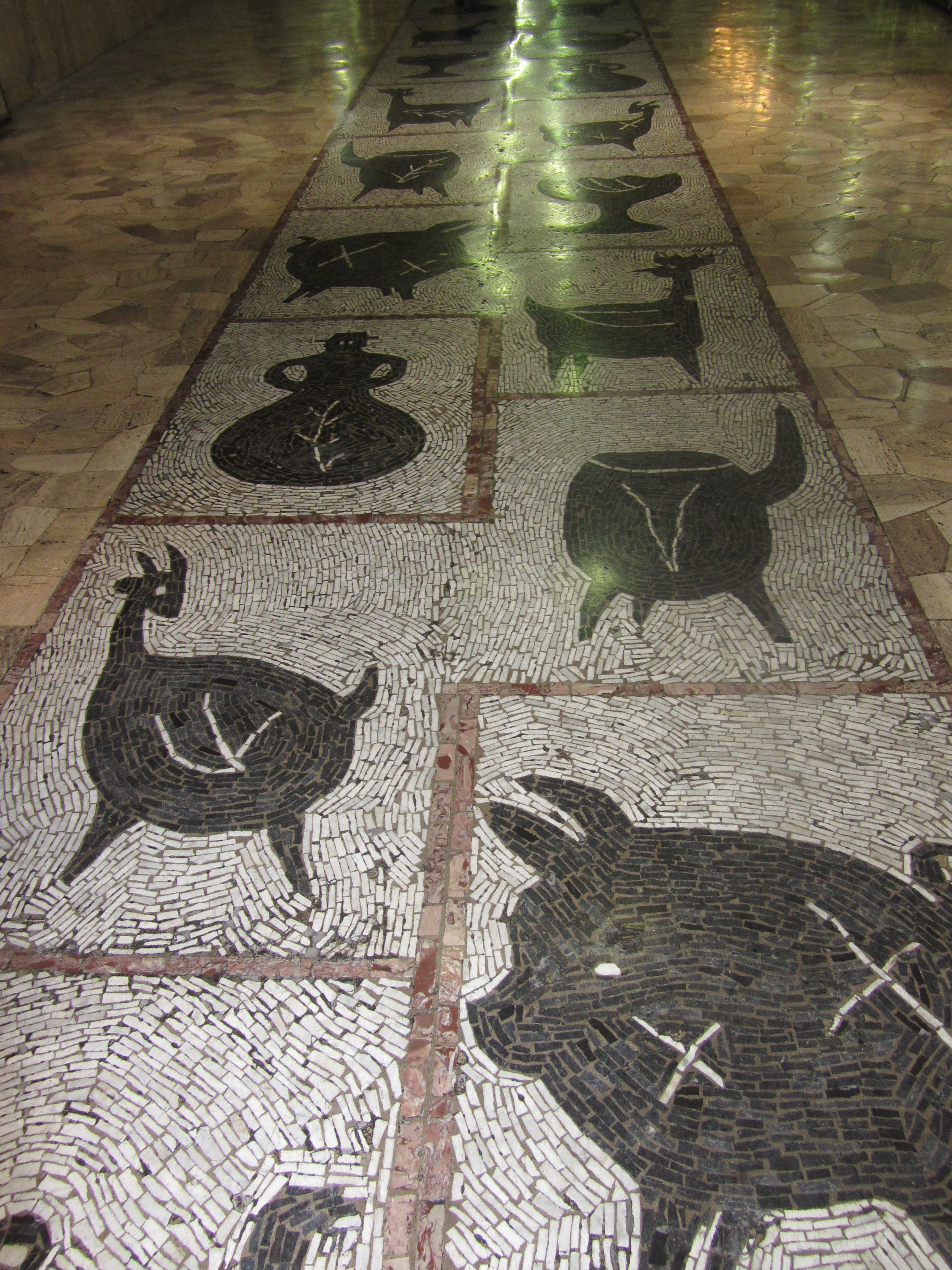 Mosaicos de Nemesio Antúnez inspirados en los ceramios de Quinchamalí; Galería Juan Esteban Montero (une las calles Huérfanos con San Antonio en Santiago de Chile)